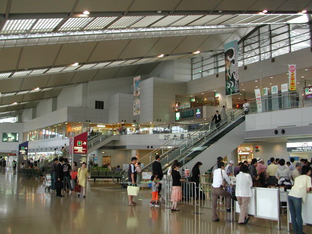 新潟空港ターミナルビル1階